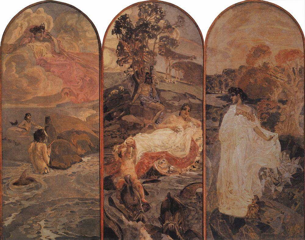 Суд Париса